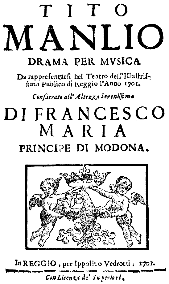 Antonio Giannettini - Tito Manlio - title page of the libretto - Reggio 1701